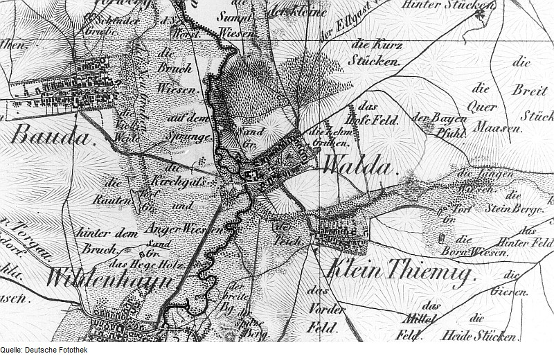 Original image description from the Deutsche Fotothek Wildenhain-Walda-Kleinthiemig. Oberreit, Sect. Großenhain, 1841/43